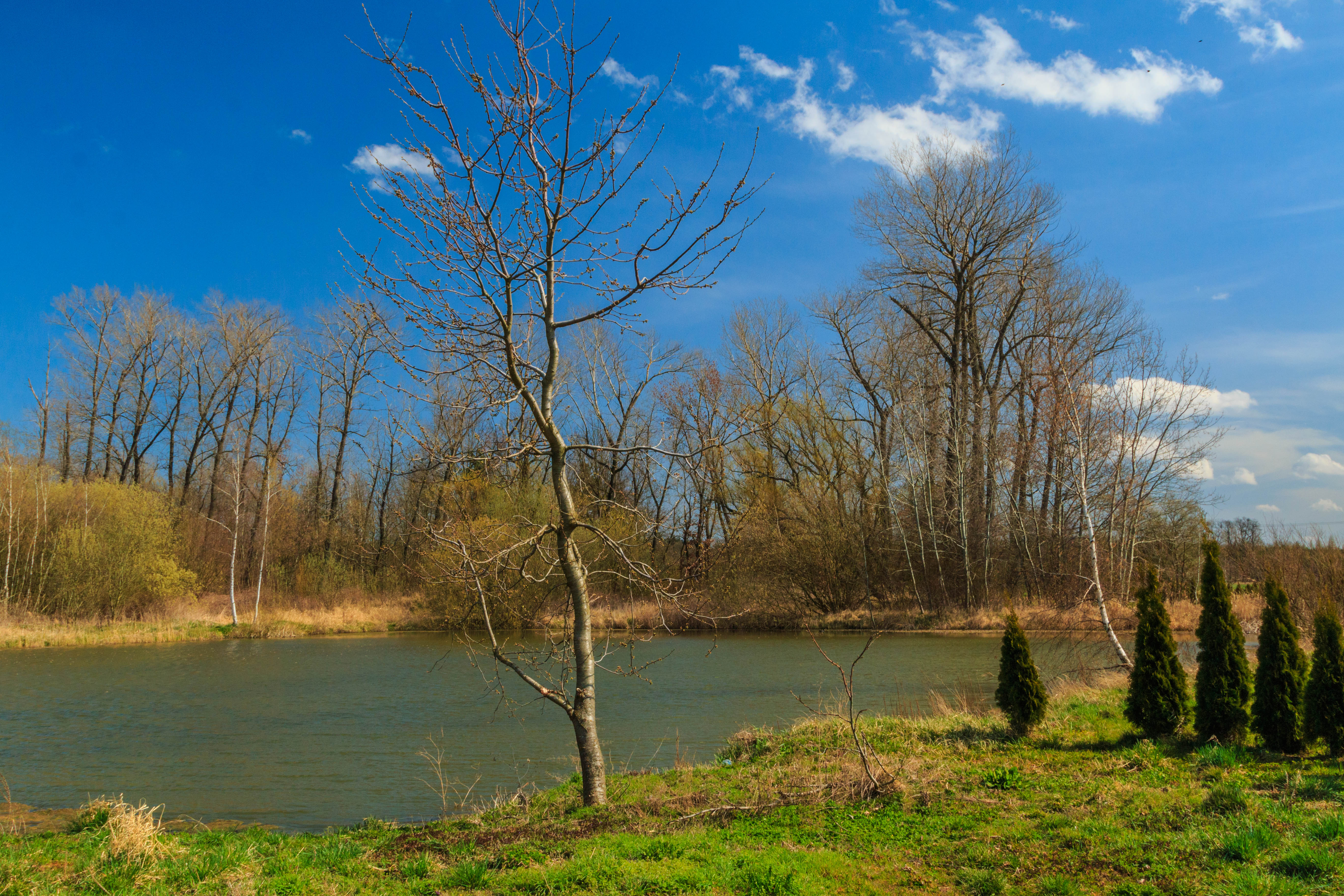 Rybník Beránek u Barchova Project: Vodstvo.